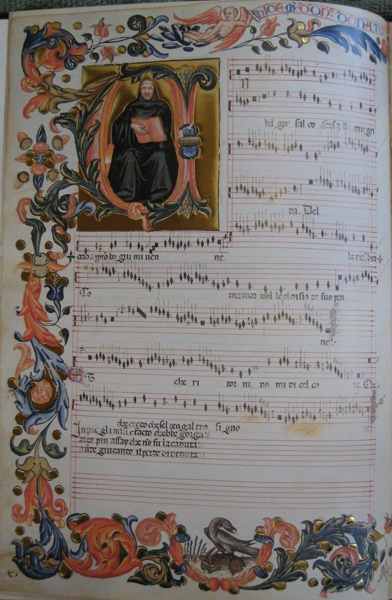 Un bel girfalco sces' alle mie grida, Codex Squarcialupi